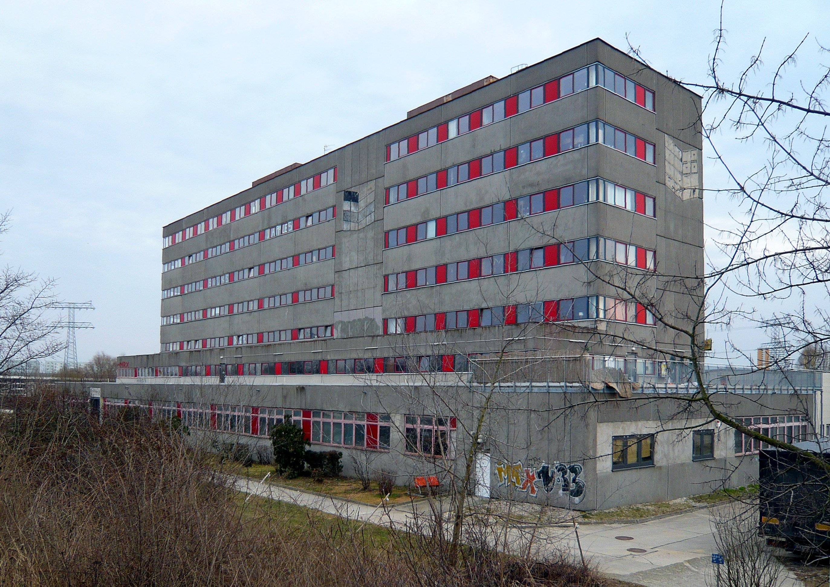 Ortsteil Berlin-Marzahn: OrwoHaus, von der Landsberger Allee aus gesehen